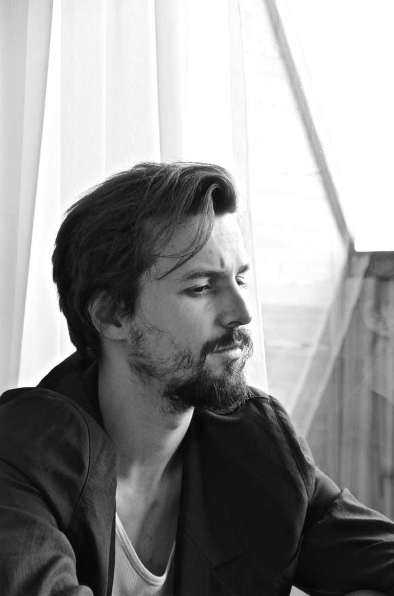 Simon Alois Huber beim Theaterstück "Alma - A Show Biz ans Ende" von Paulus Manker.